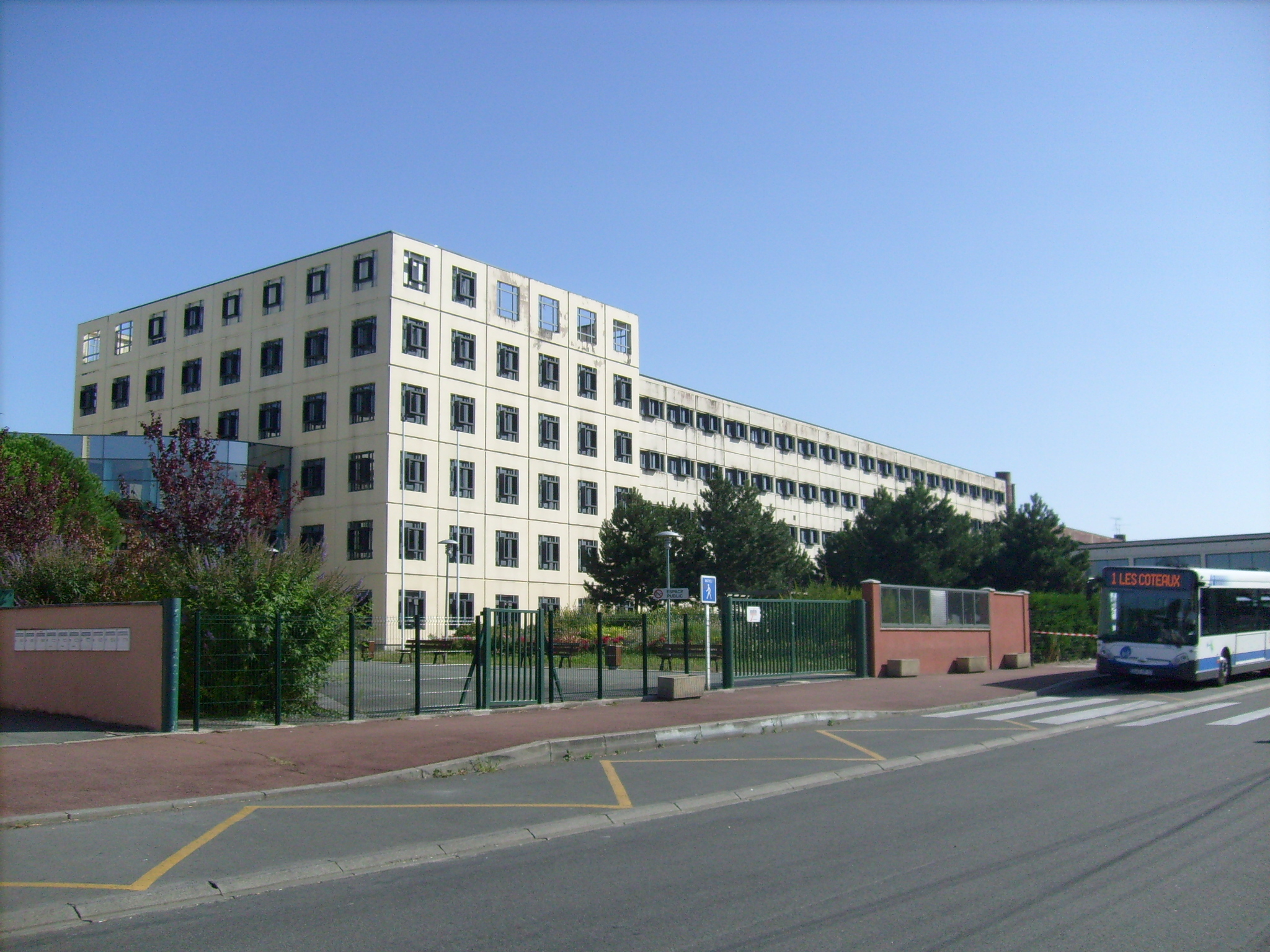 Le lycée Bernard Palissy à Saintes